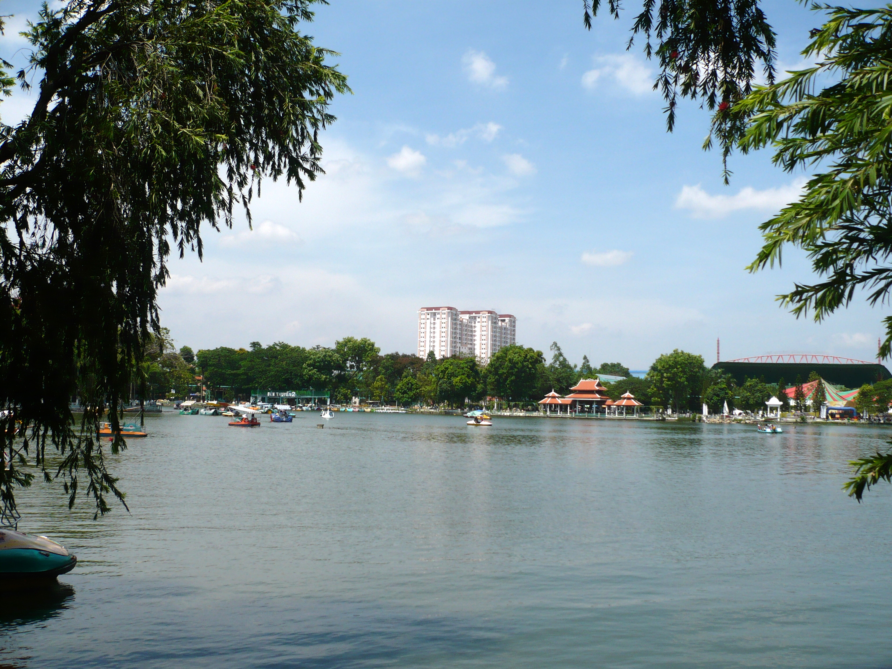 Hồ nước ở CVVH Đầm Sen